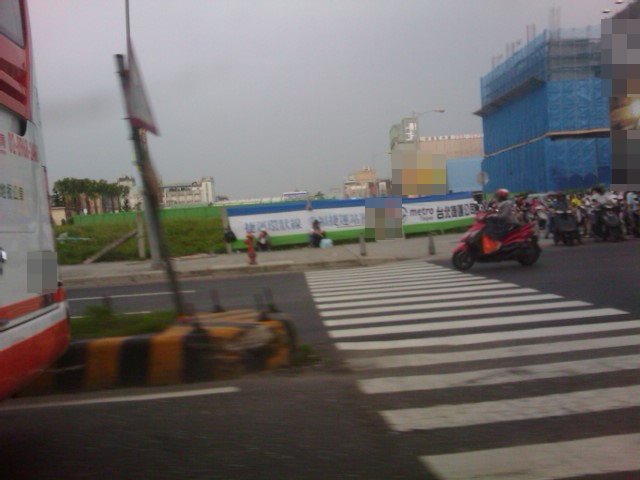 台北捷運環狀線幸福站預定地。